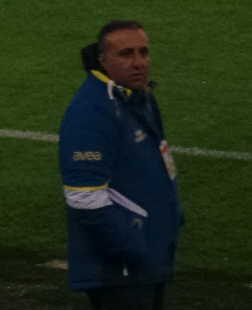 Burak Kunduracıoğlu